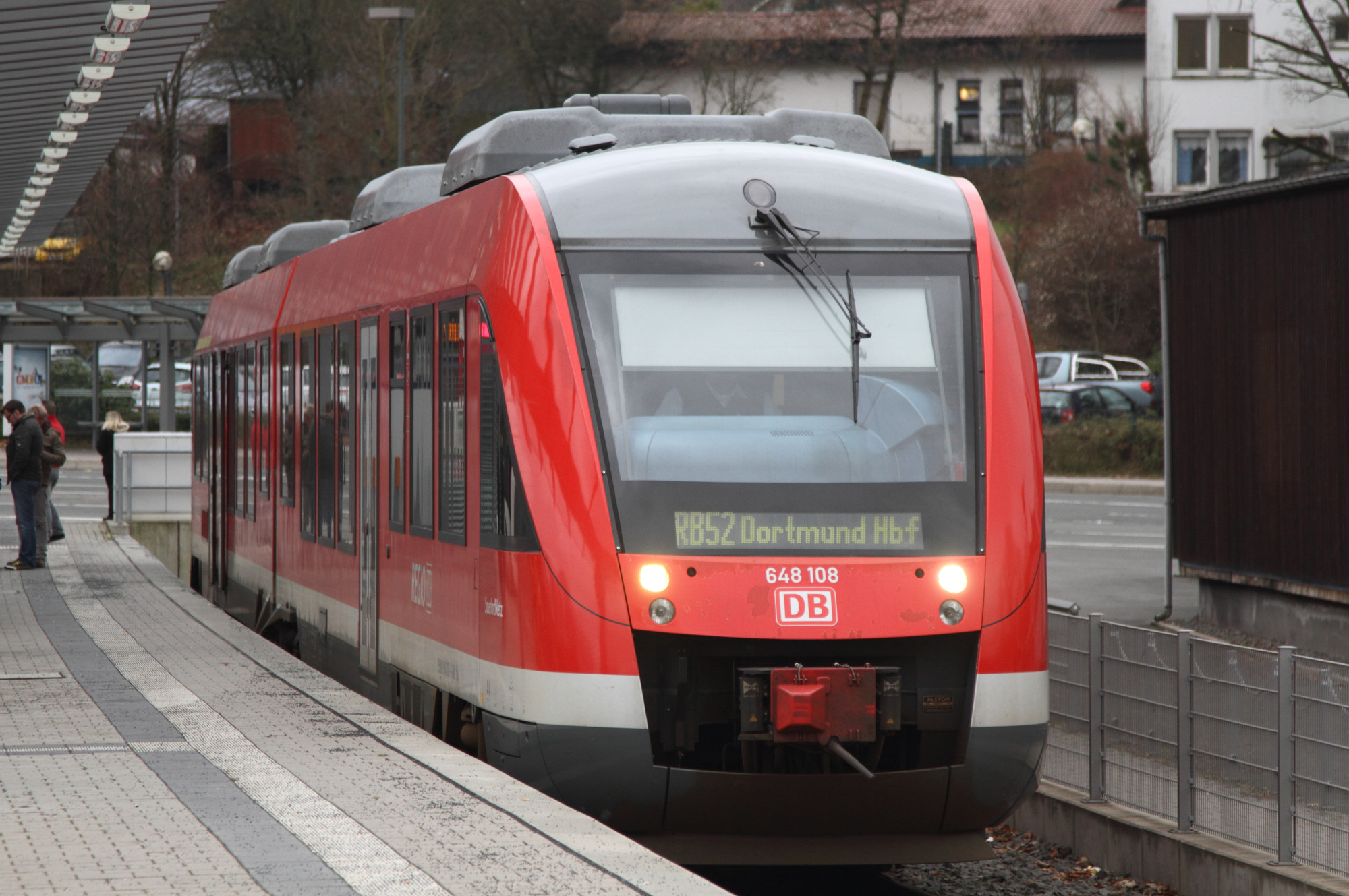 Regionalbahn 52 in Bahnhof Lüdenscheid